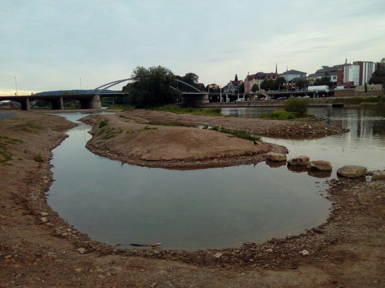 Die Stadtblänke Minden im Bauszustand: Trittstreine im Vordergrund, die Weser im Hintergrund.